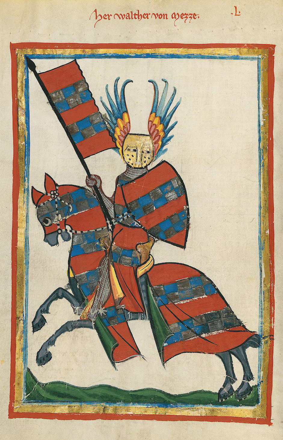 Codex Manesse, UB Heidelberg, Cod. Pal. germ. 848, fol. 166v: Herr Walther von Metze